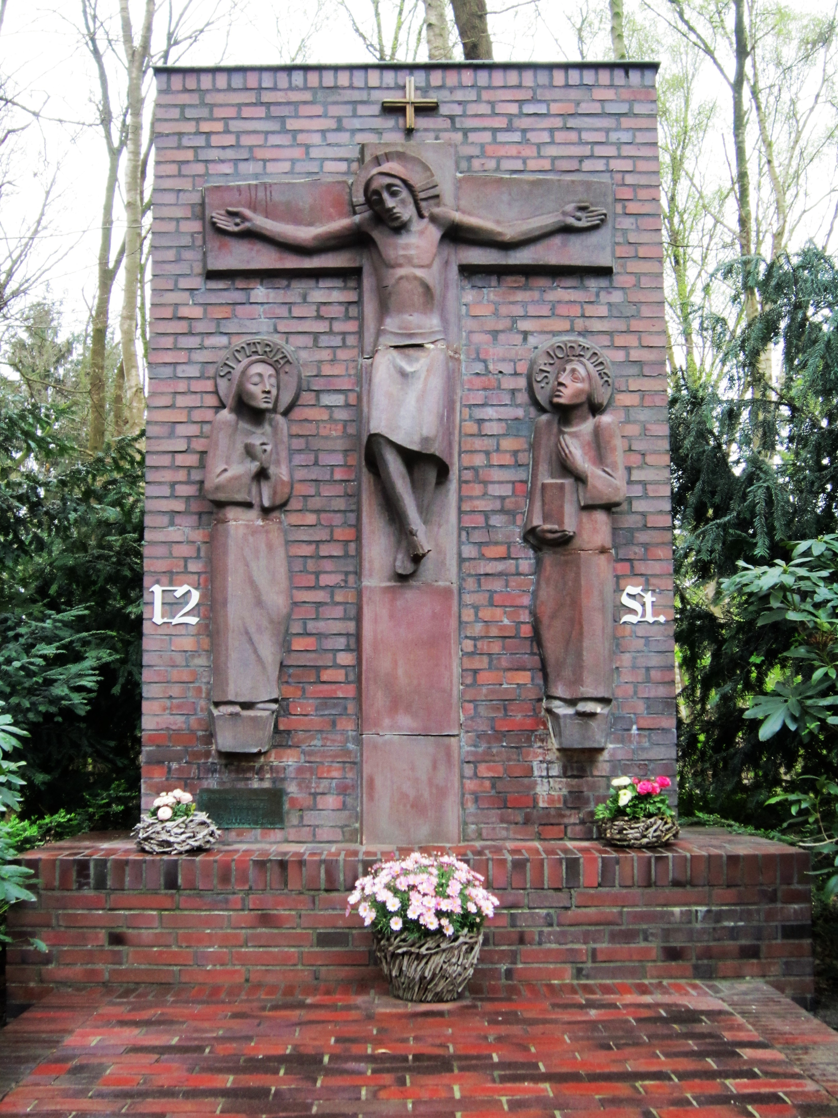 Station XII des Kreuzwegs in Visbek (Landkreis Vechta, Niedersachsen)